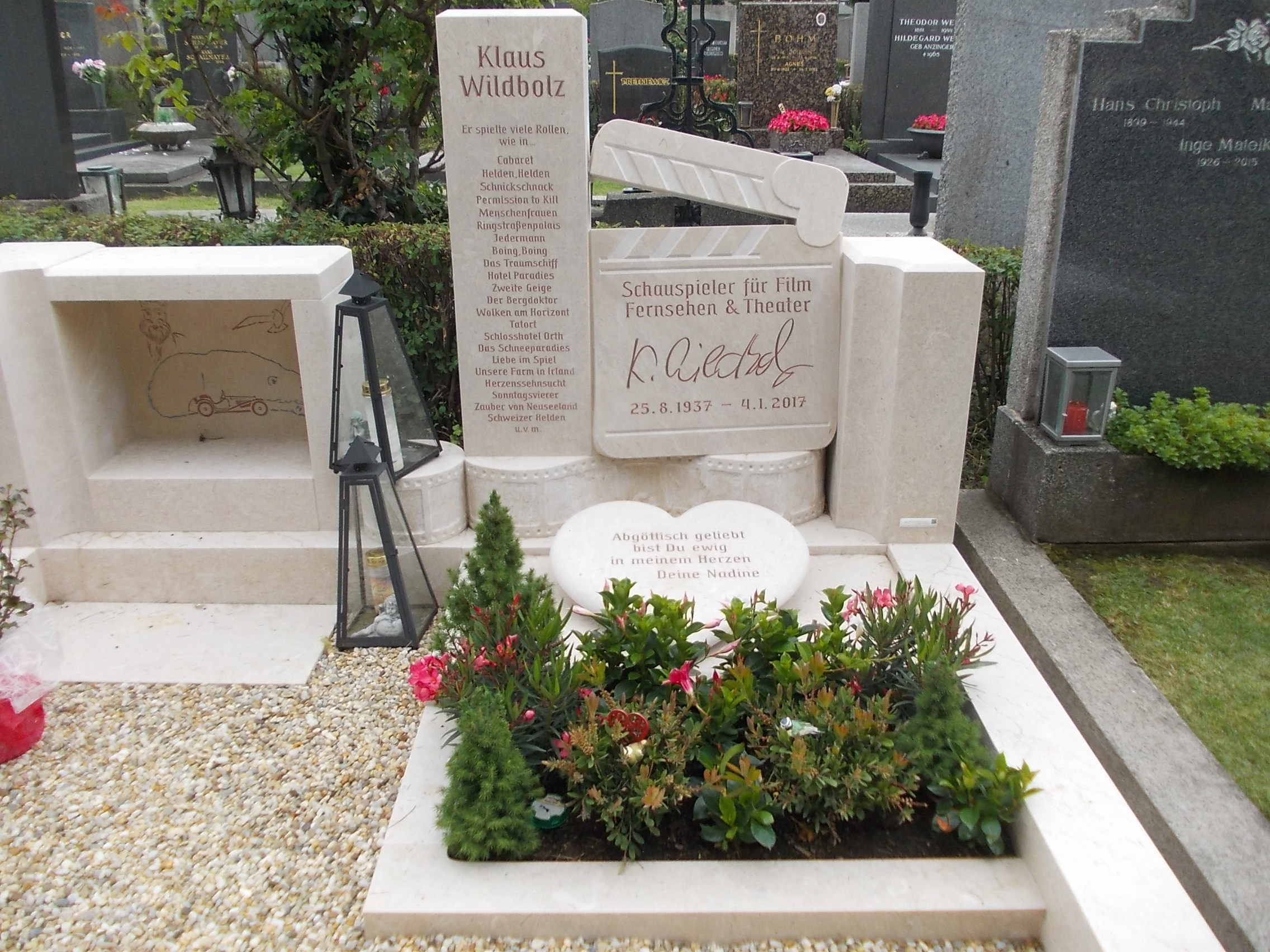 Grab Klaus Wildbolz-HietzingerFriedhof